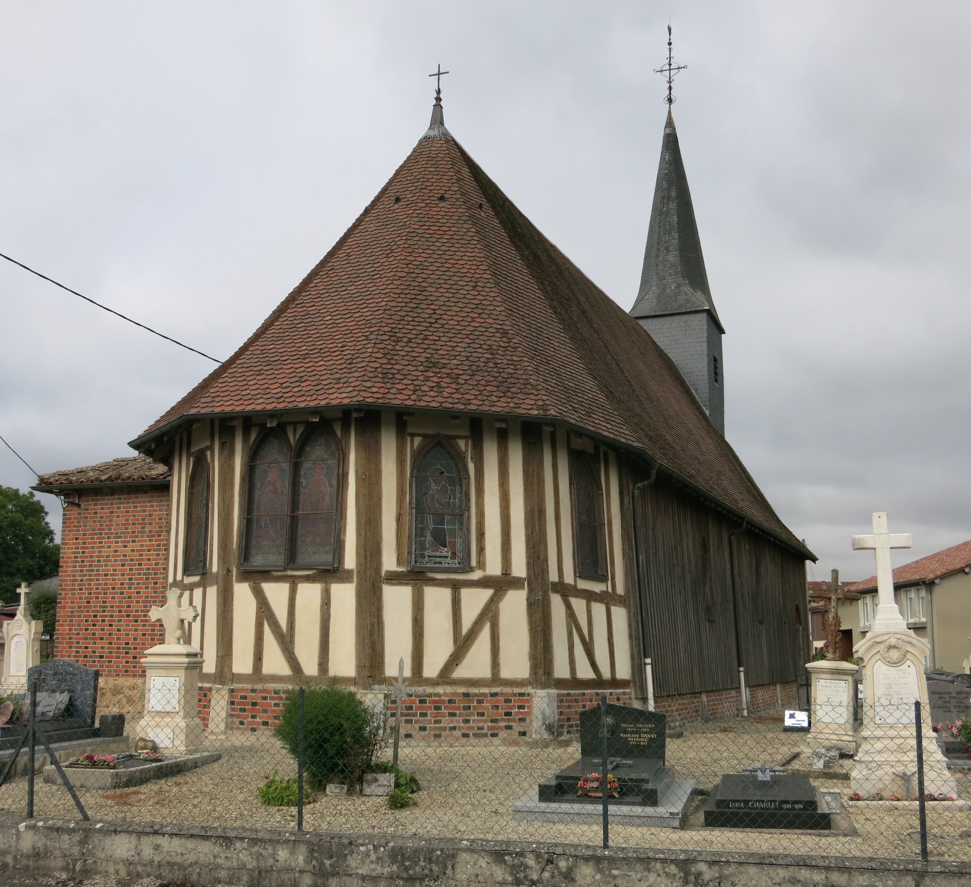 Saint-Claude kerk in hout in Le Chemin (France) 1505